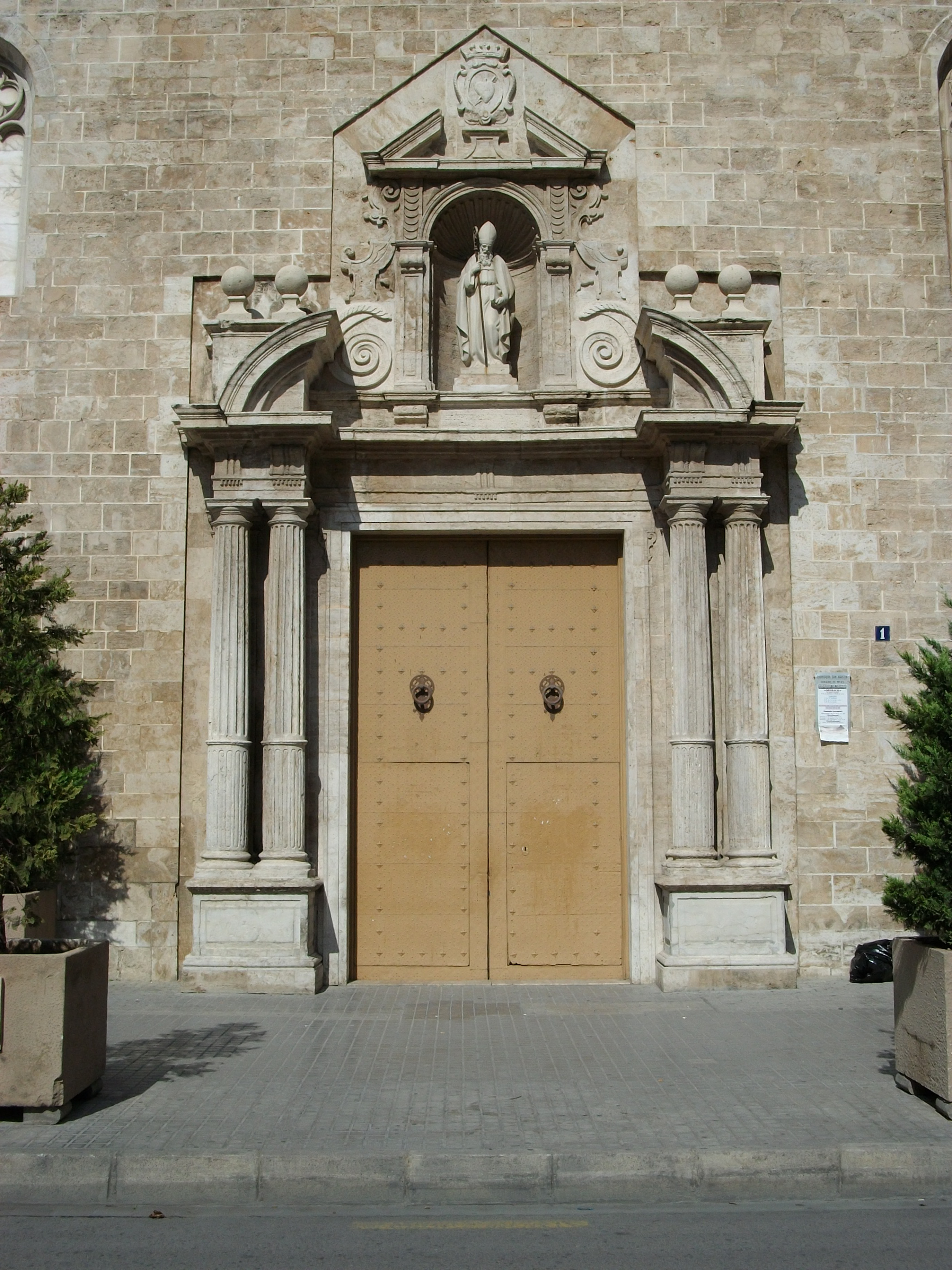 Portada, lateral, de l'església de Sant Agustí de València.